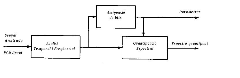 Diagrama de bloques ATRAC